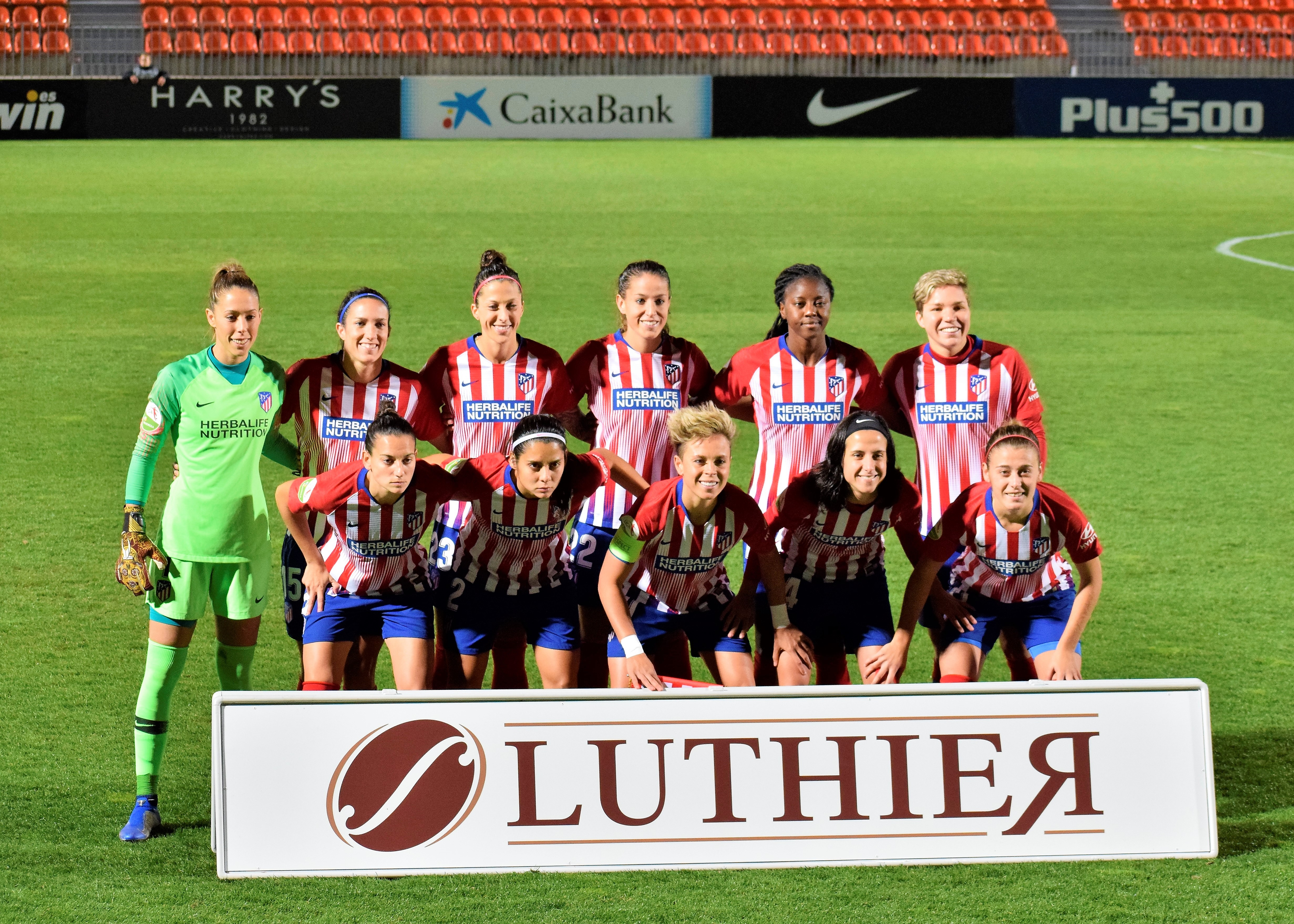 El Atlético de Madrid femenino posando